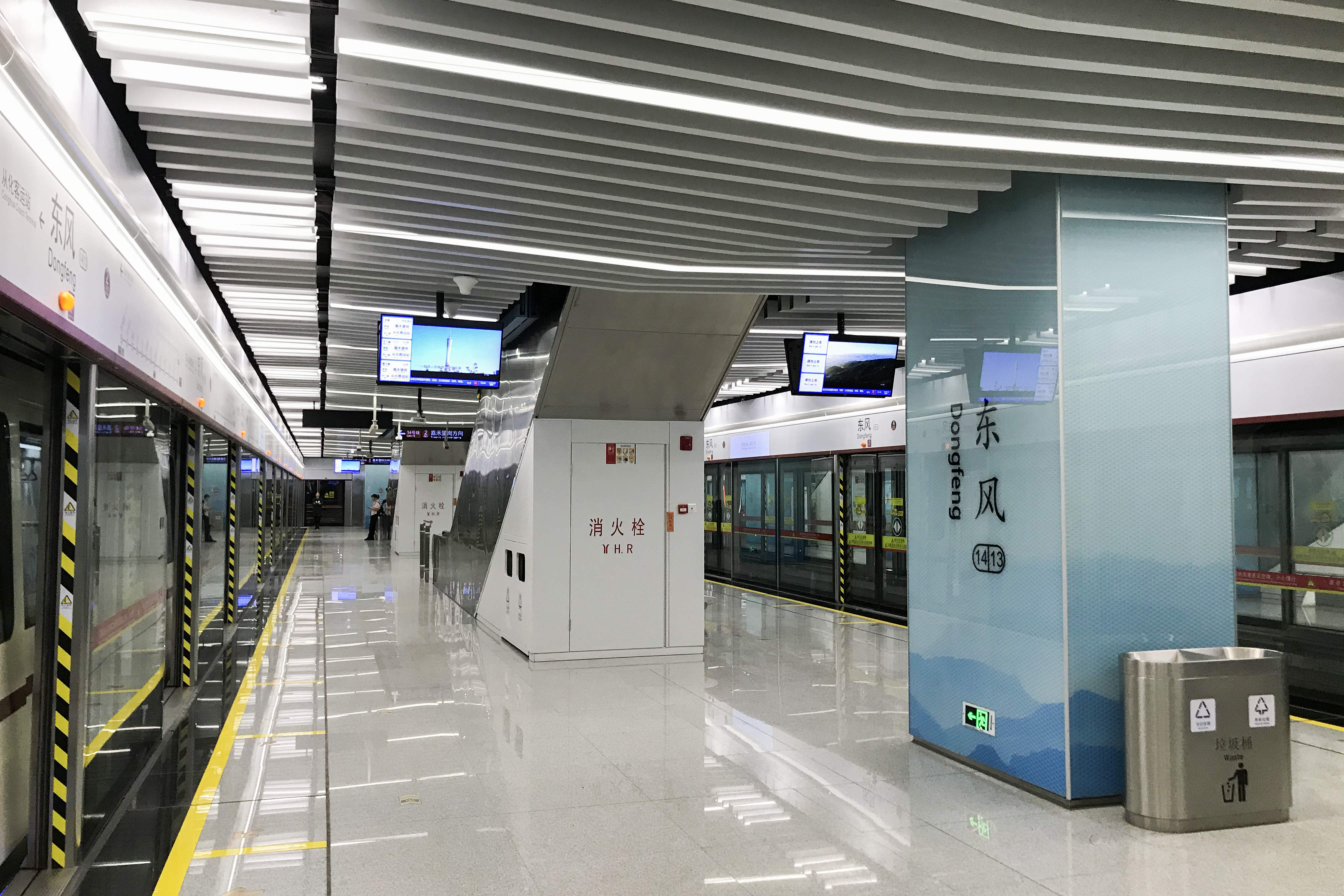 广州地铁东风站